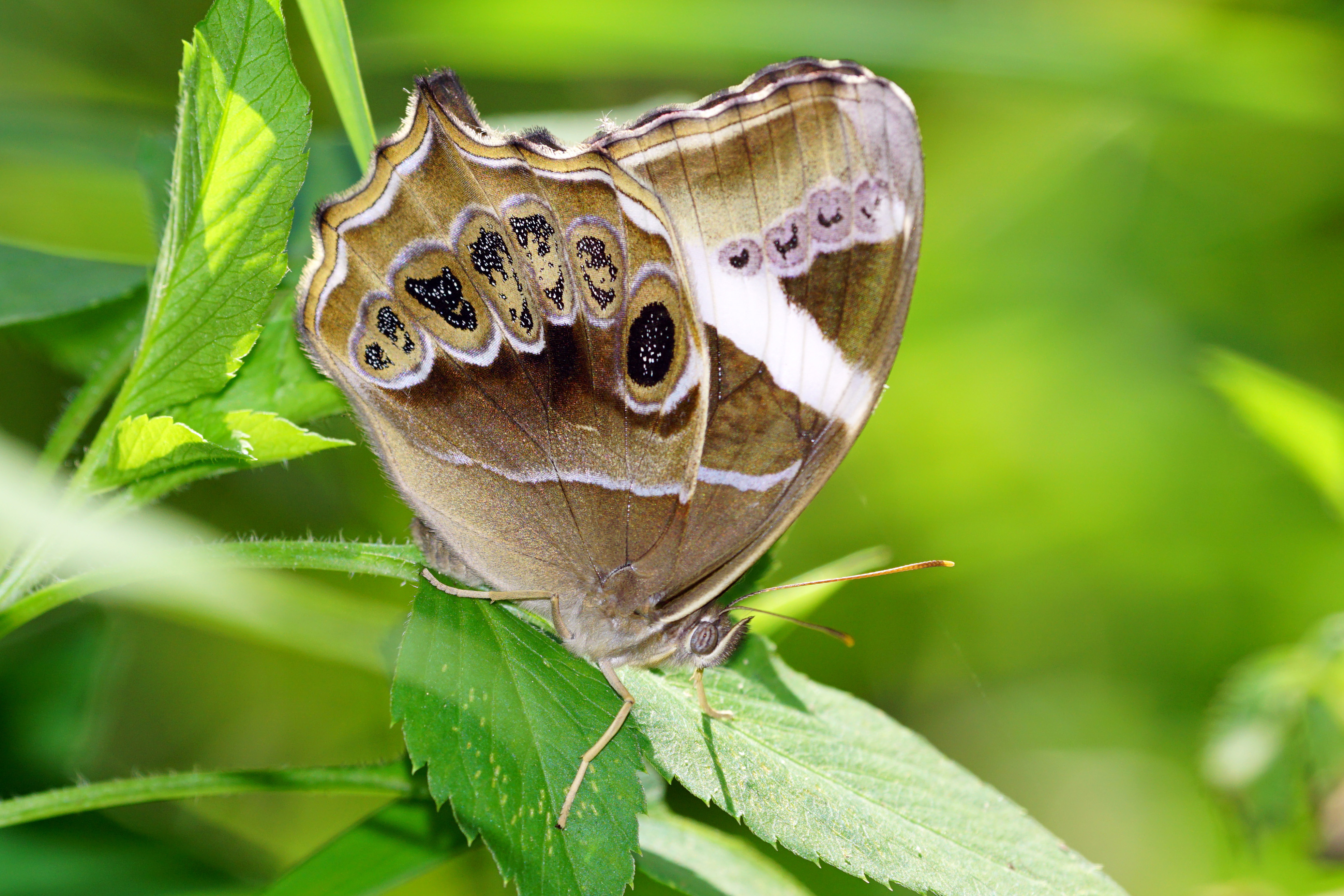 長紋黛眼蝶Lethe europa pavida